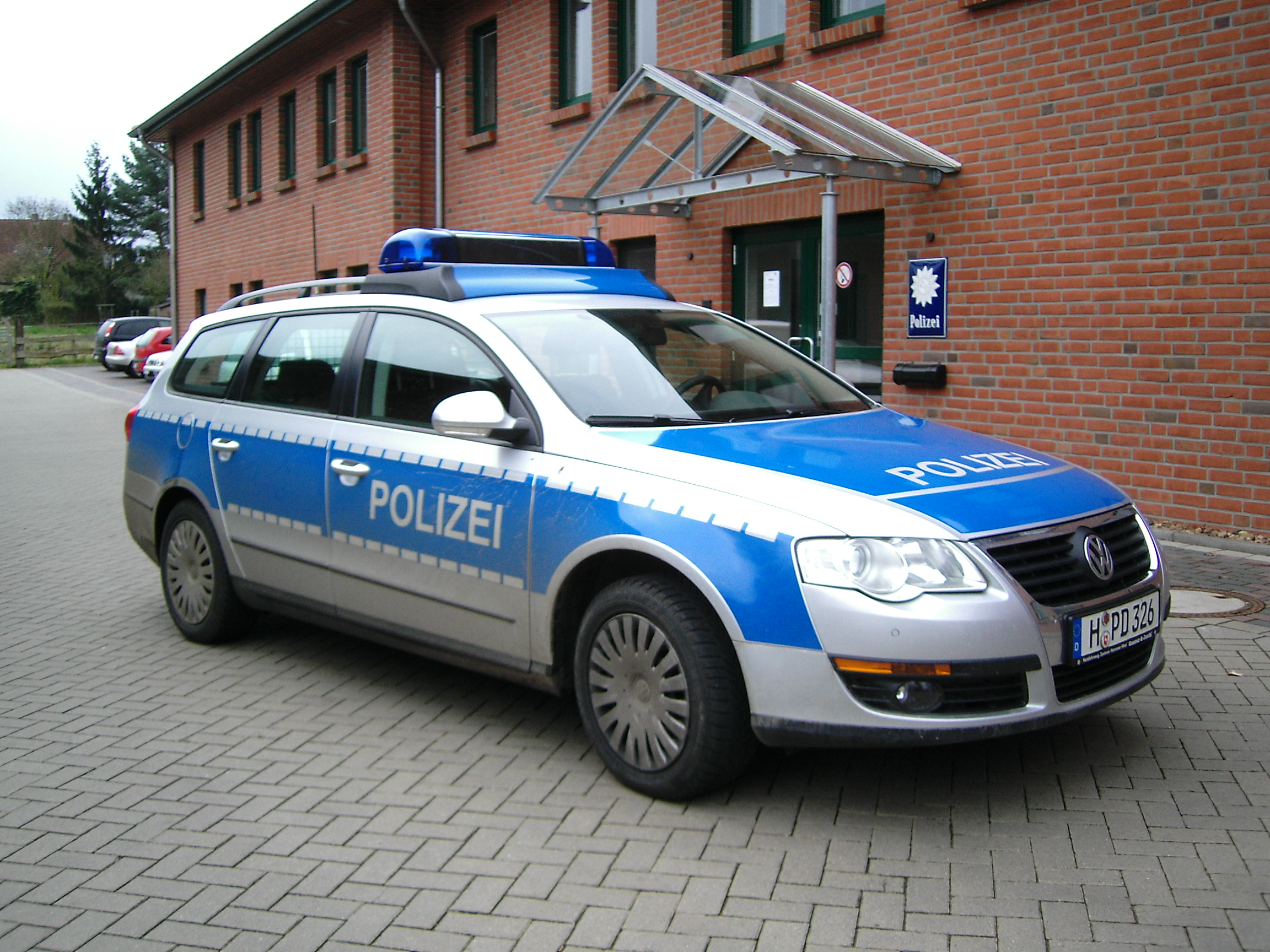 Einsatzfahrzeug der Polizei Niedersachsen vom Typ VW Passat